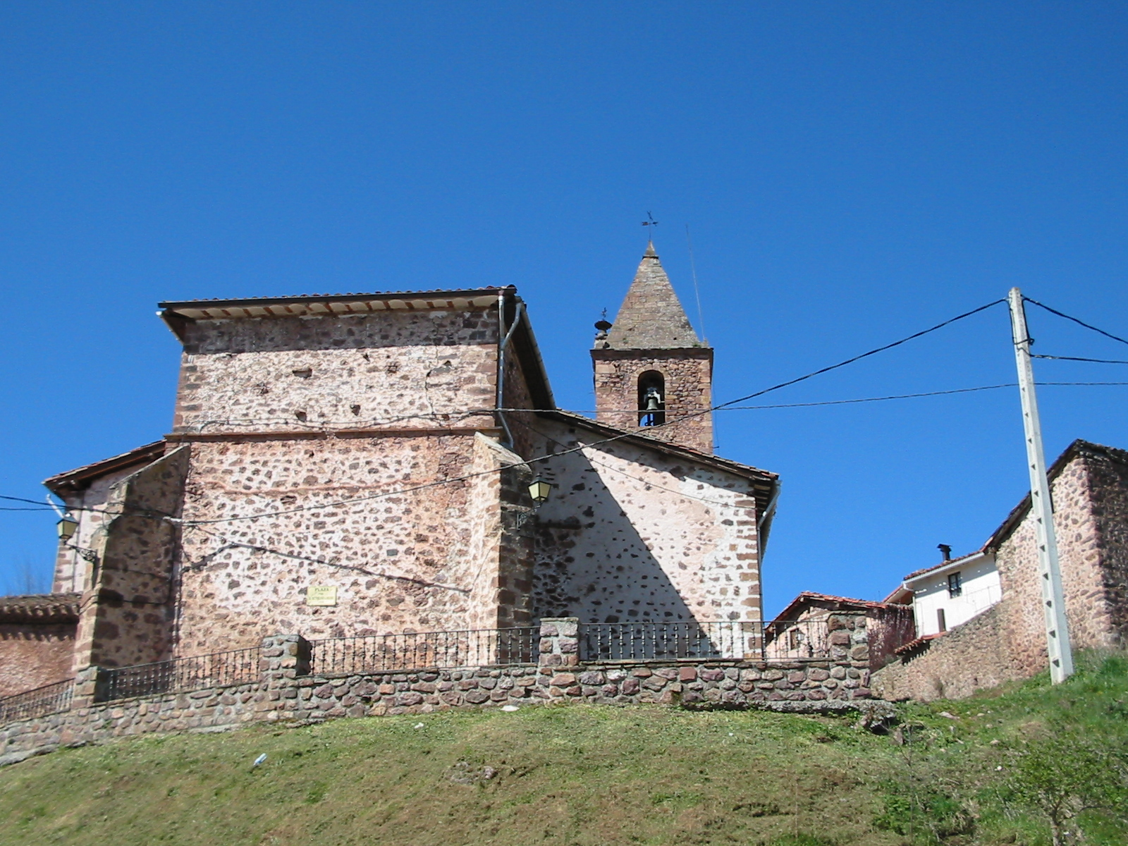 Image of The Church Virgen de las Eras. El Rasillo de Cameros (La Rioja).